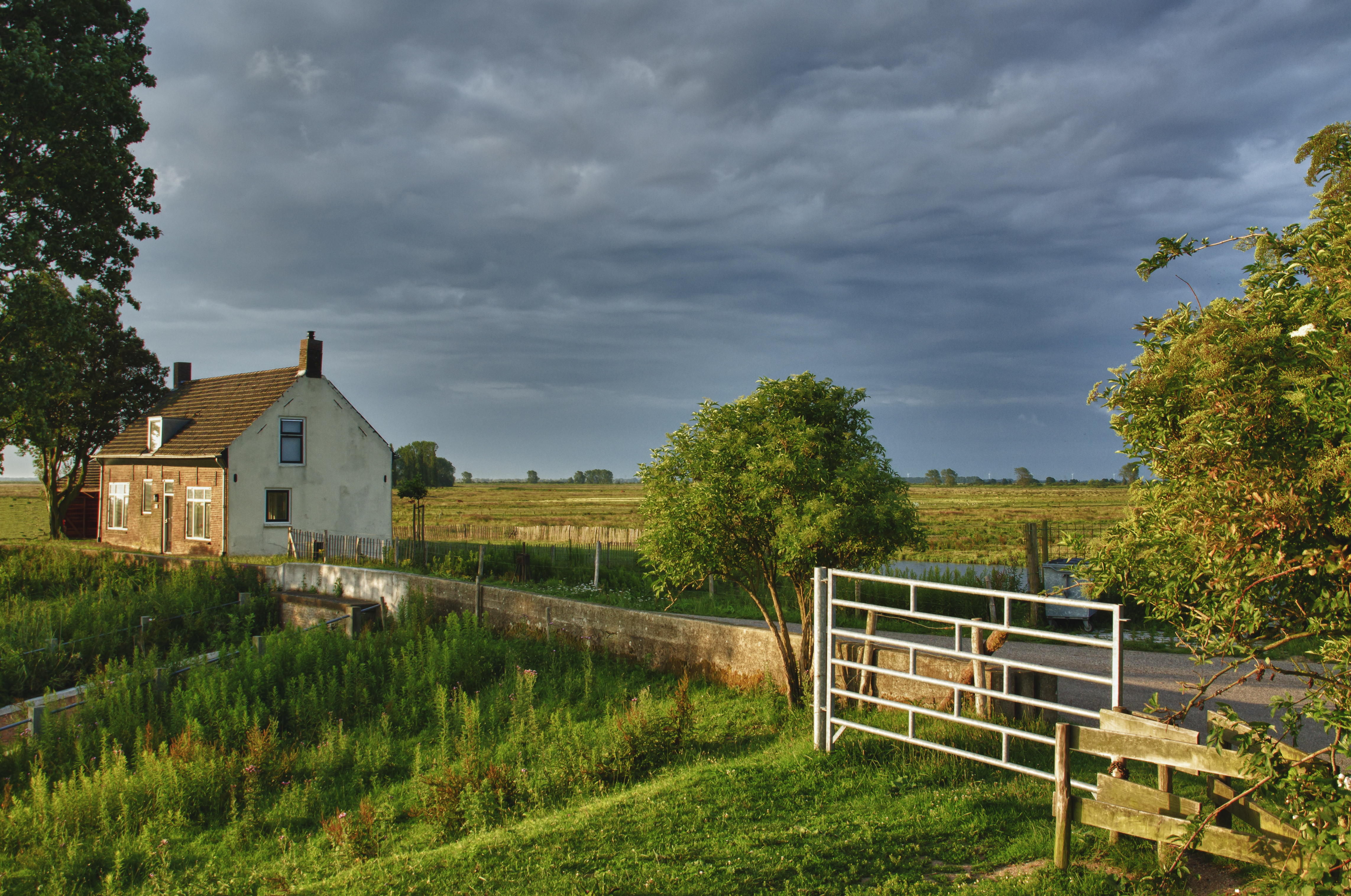 Tiengemeten - Zuid-Holland - the Netherlands